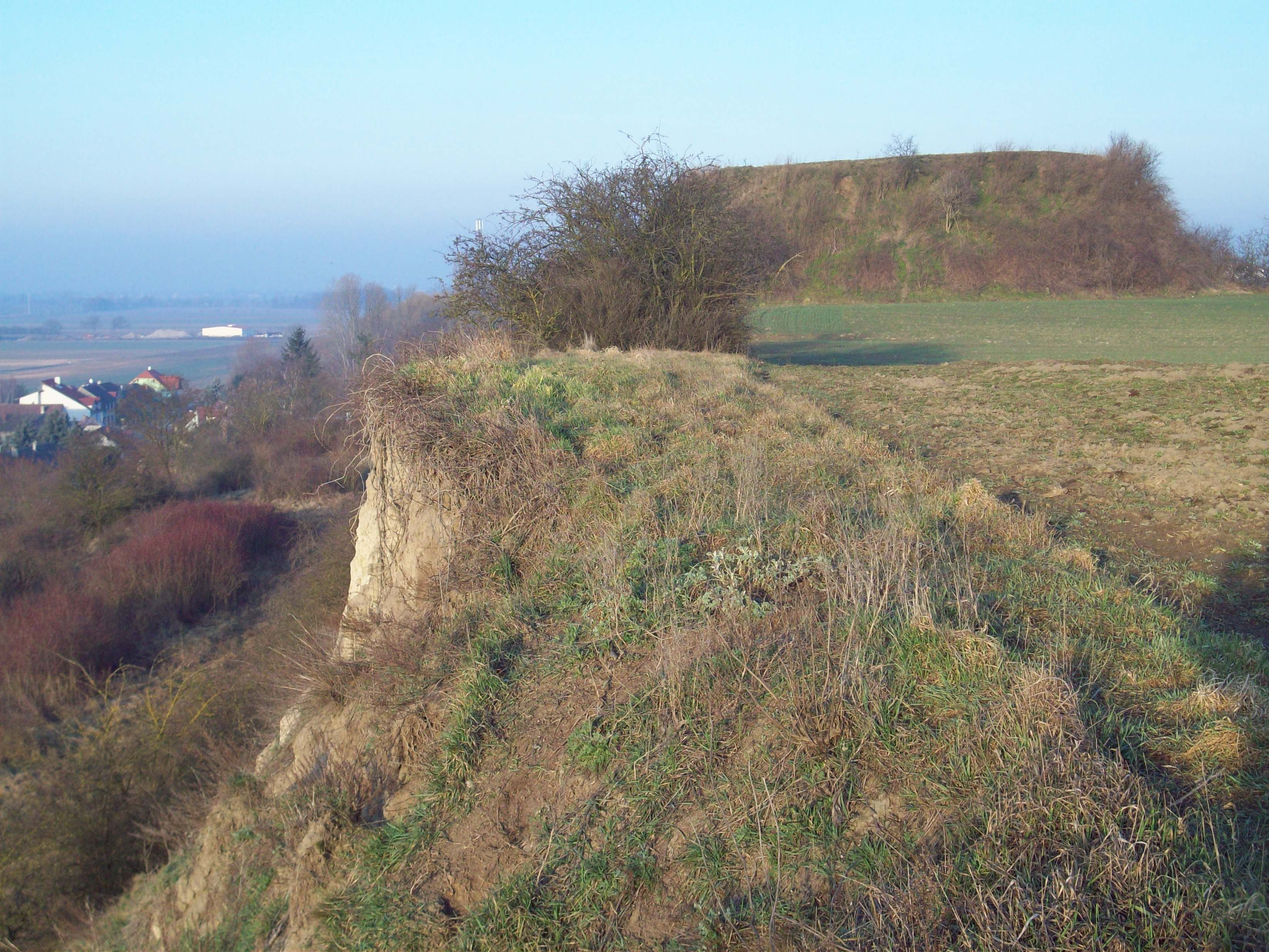 Denkmalgeschützter Tumulus in Pettendorf, eine Ortschaft in der niederösterreichischen Gemeinde Hausleiten.